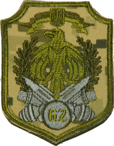 Нарукавний знак, 62 арсенал